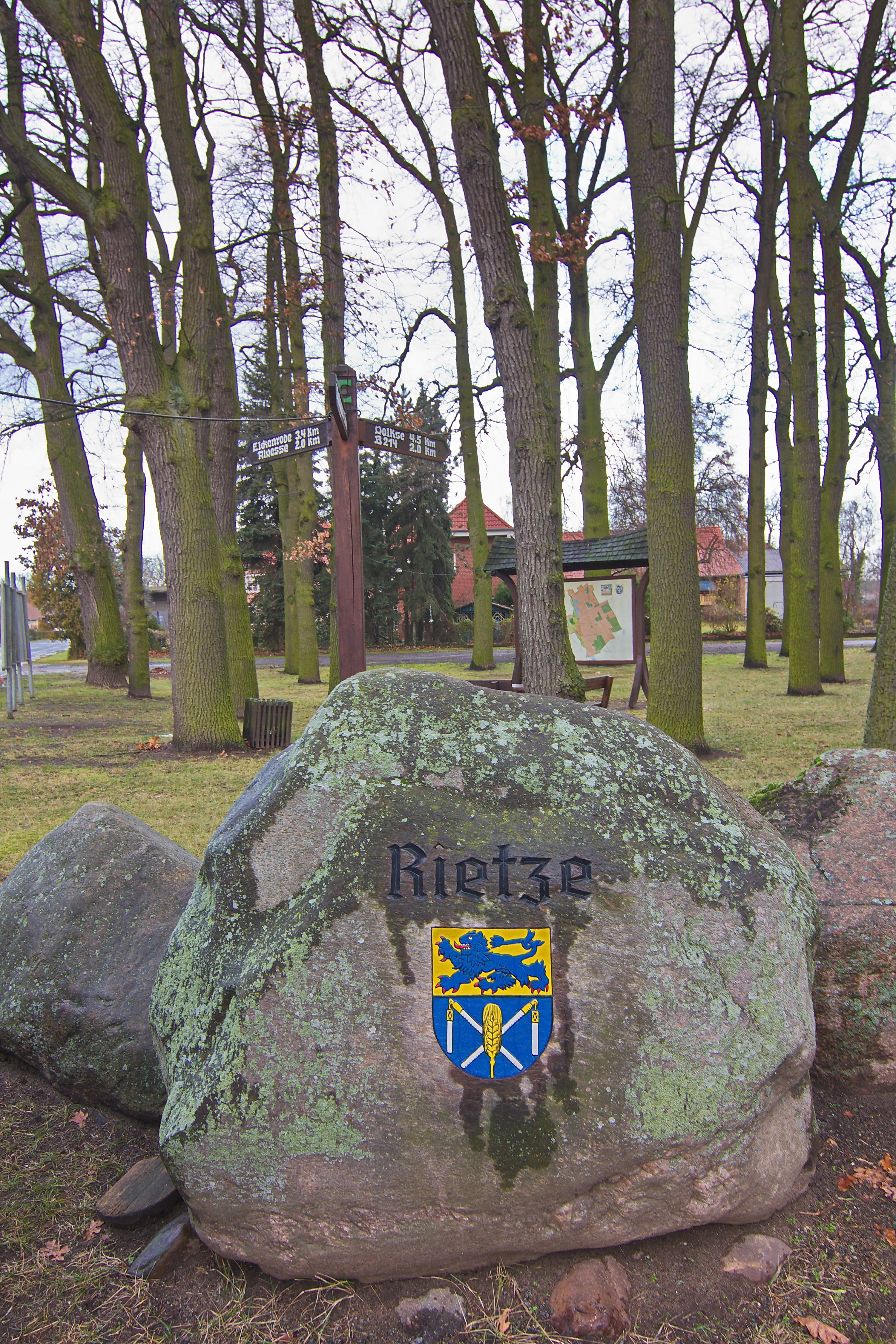 Gedenkstein in Rietze (Edemissen), Niedersachsen, Deutschland